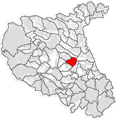 Categorie:Hărţi ale judeţului Vrancea